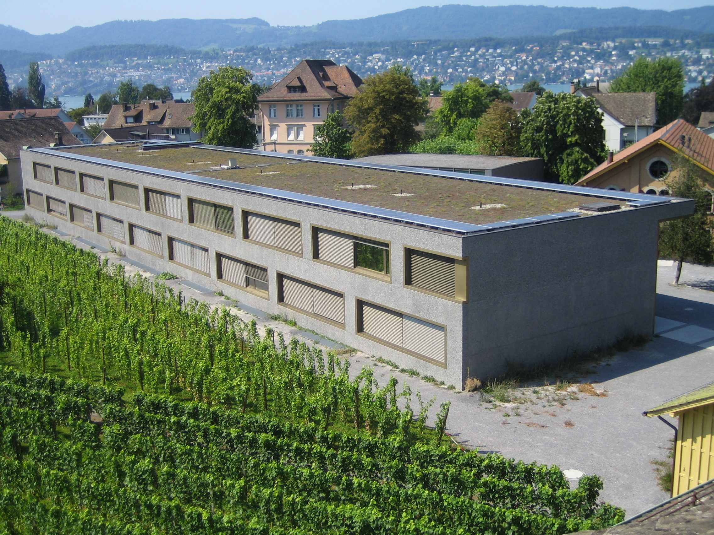 Die Solaranlage auf dem Dach des Klassentrakts, Kantonsschule Küsnacht.